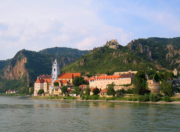 Dürnstein from Donau, Wachau Austria